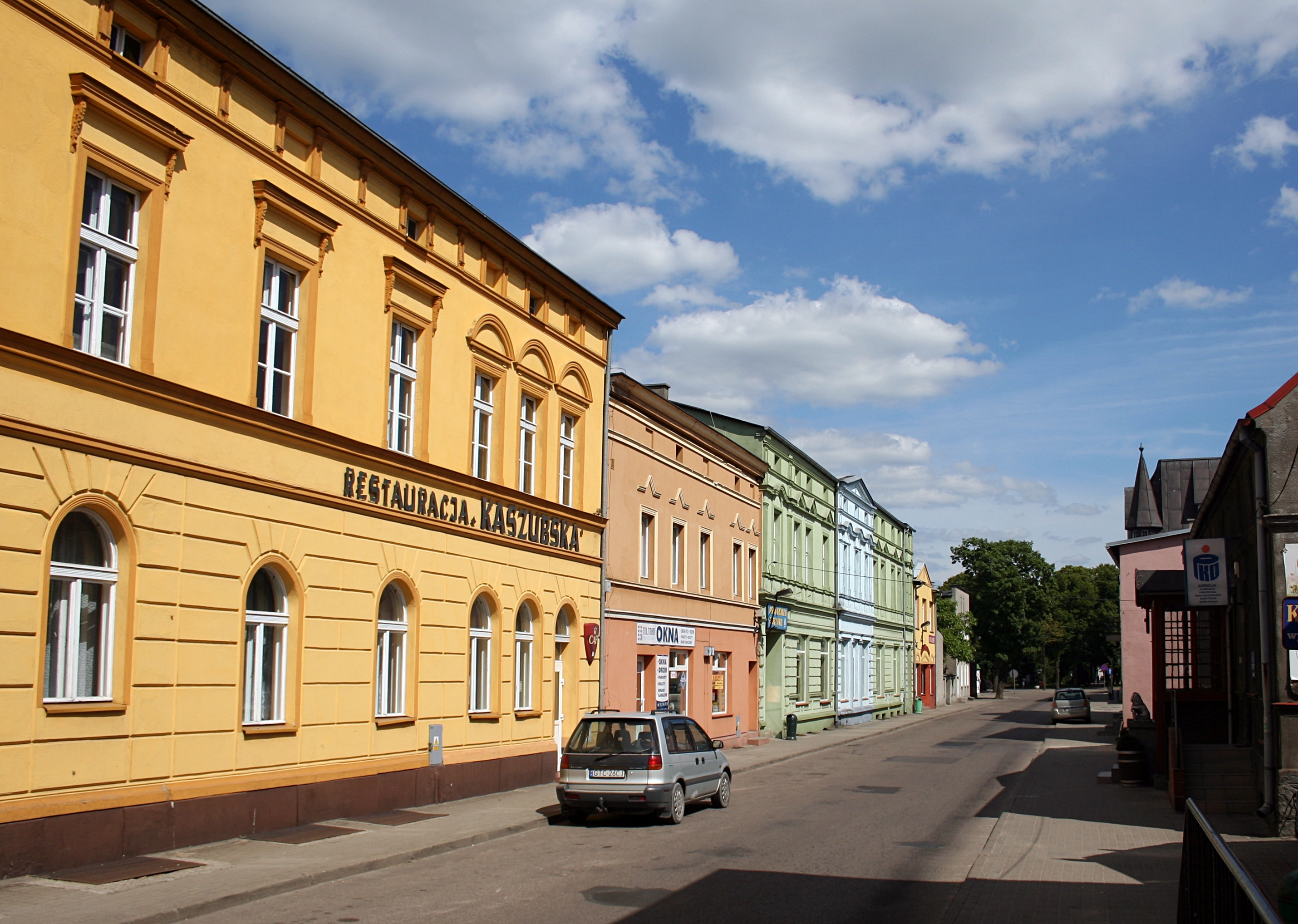 Ulica 2 lutego w Brusach